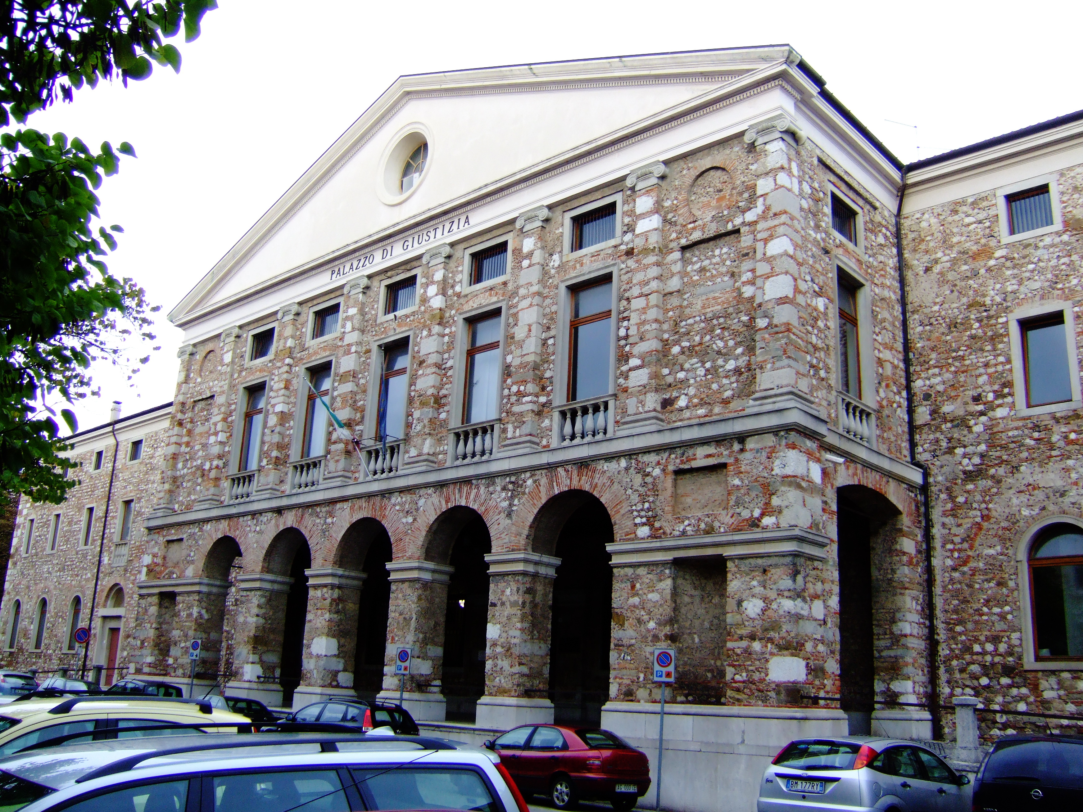 Udine - Ex convento di San Francesco Ora Tribunale